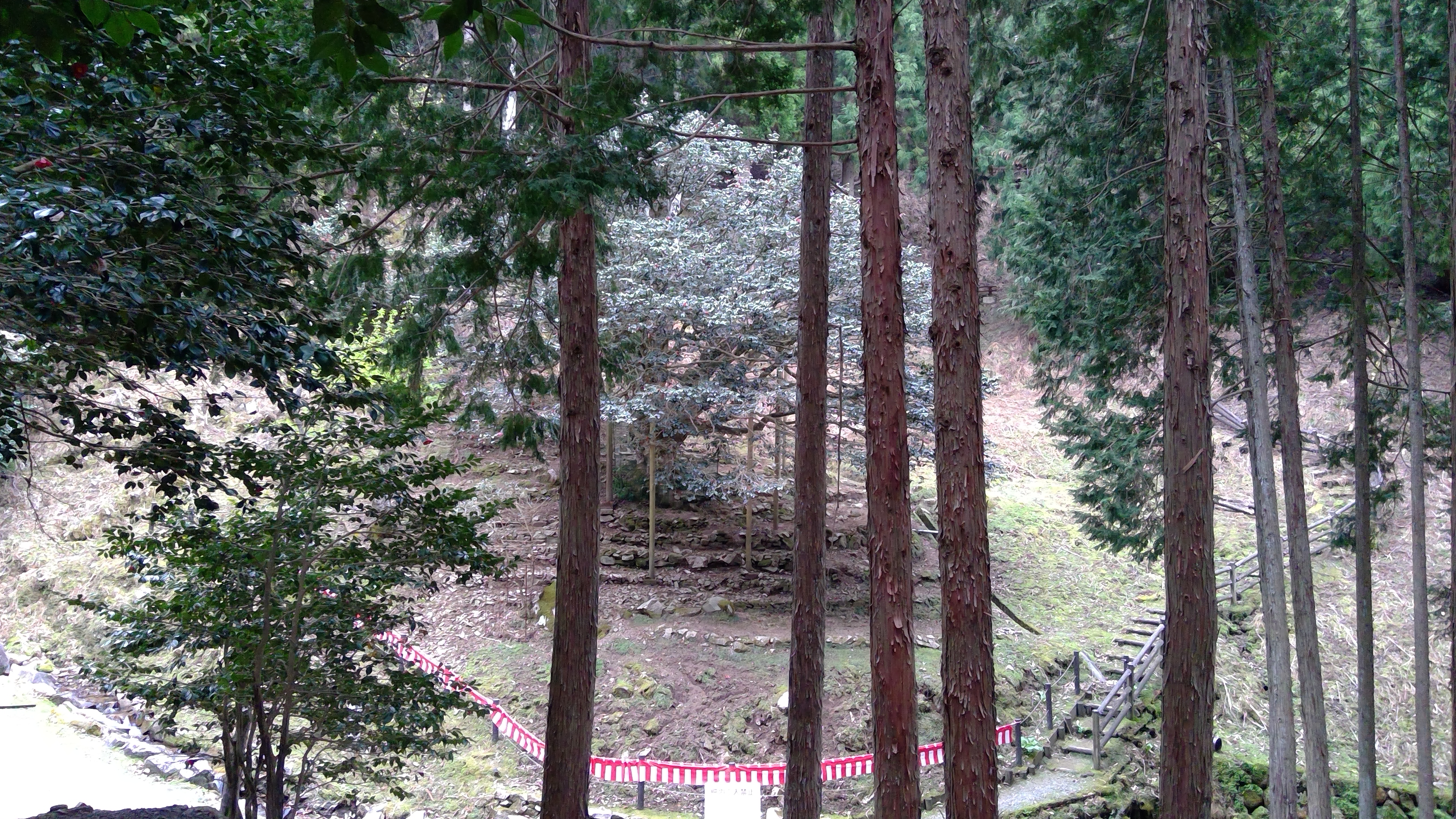 「千年椿」の愛称で親しまれる京都府与謝野町滝にあるヤブツバキの巨木